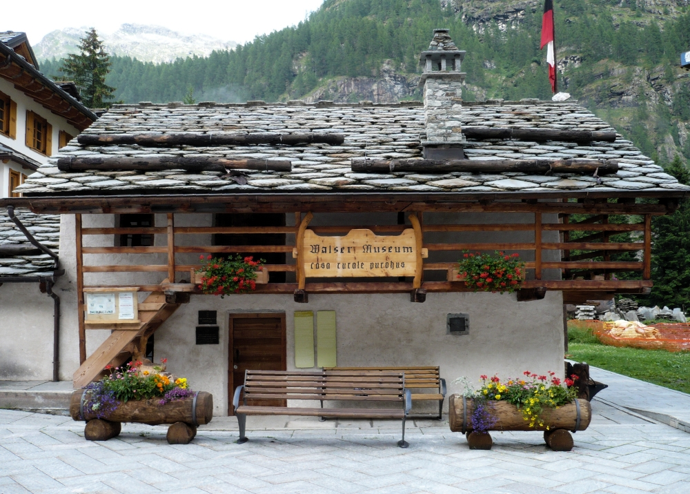 Walsermuseum in Gressoney-La-Trinité